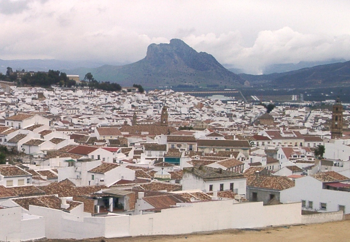 Antequera, al fondo Peña de los Enamorados